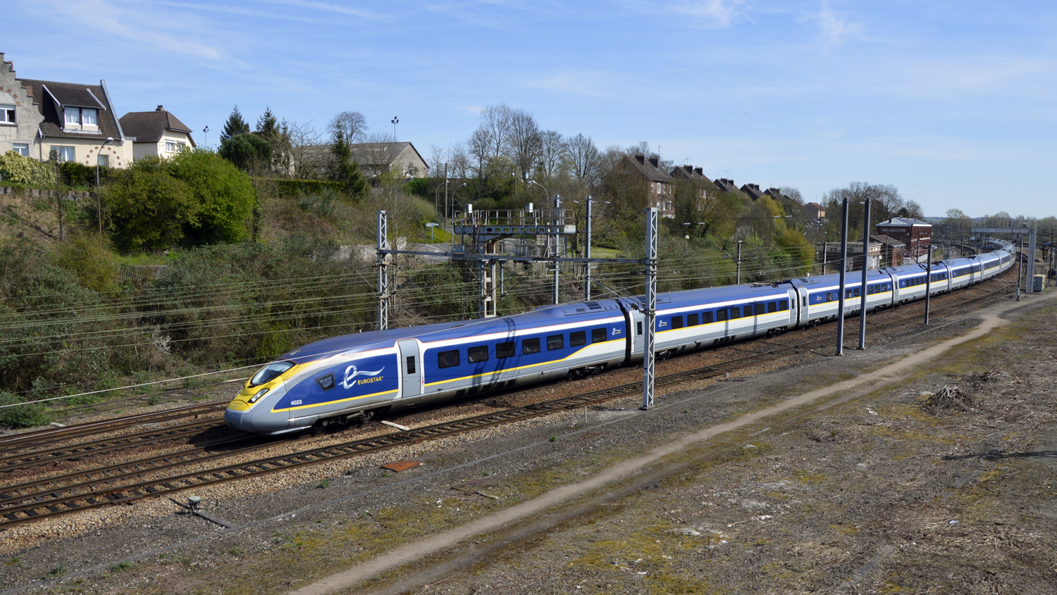 le Velaro E320, rame 4023/24 sur l'Eurostar 9031 Paris/London St Pancras détourné par Longueau